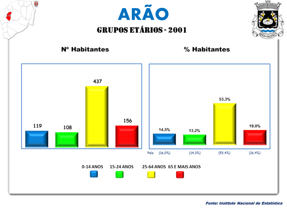 Censos 1864/2011